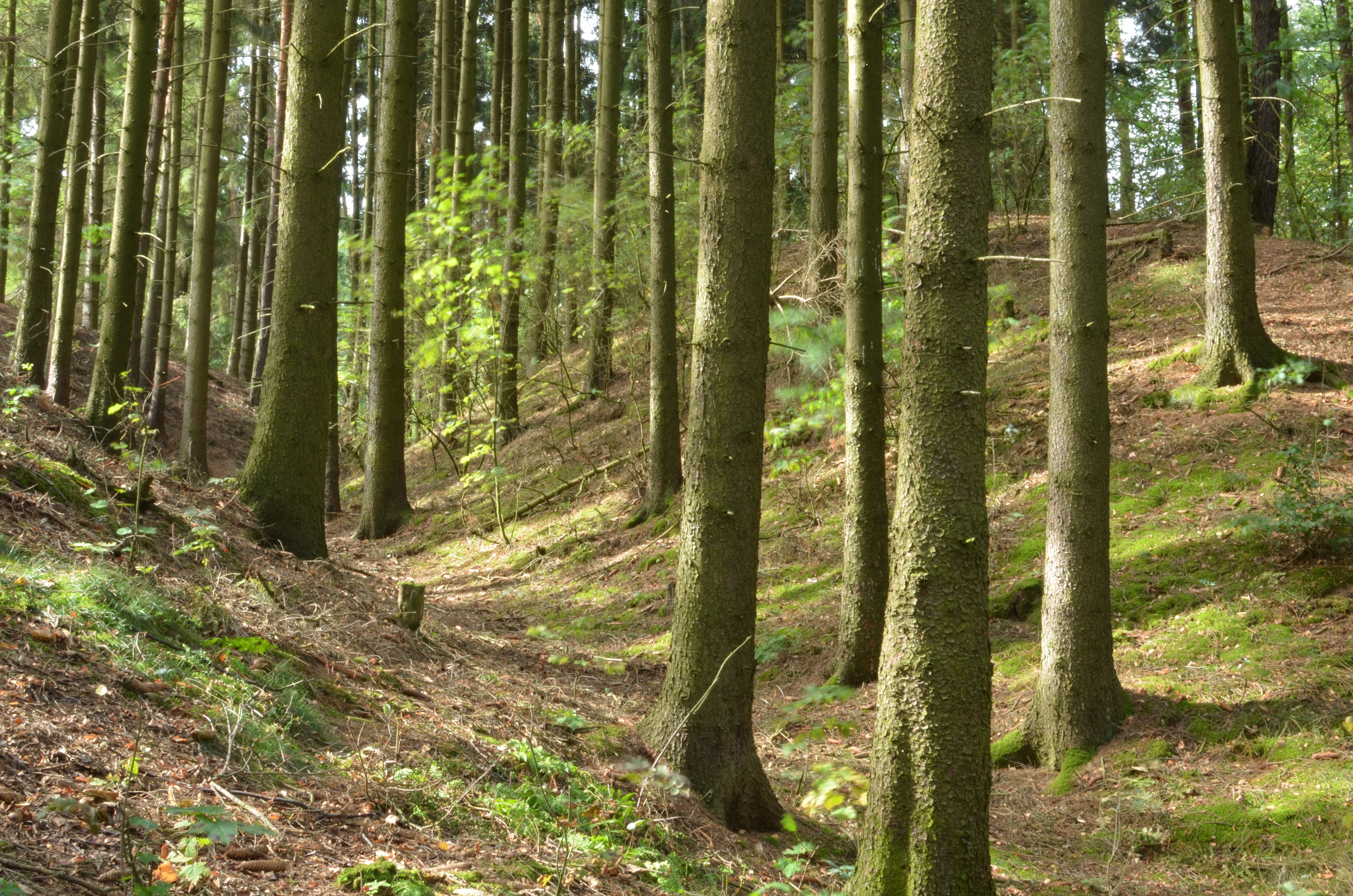 Úbočí - Hrad Borschengrün - příkop a valy v původní jižní části